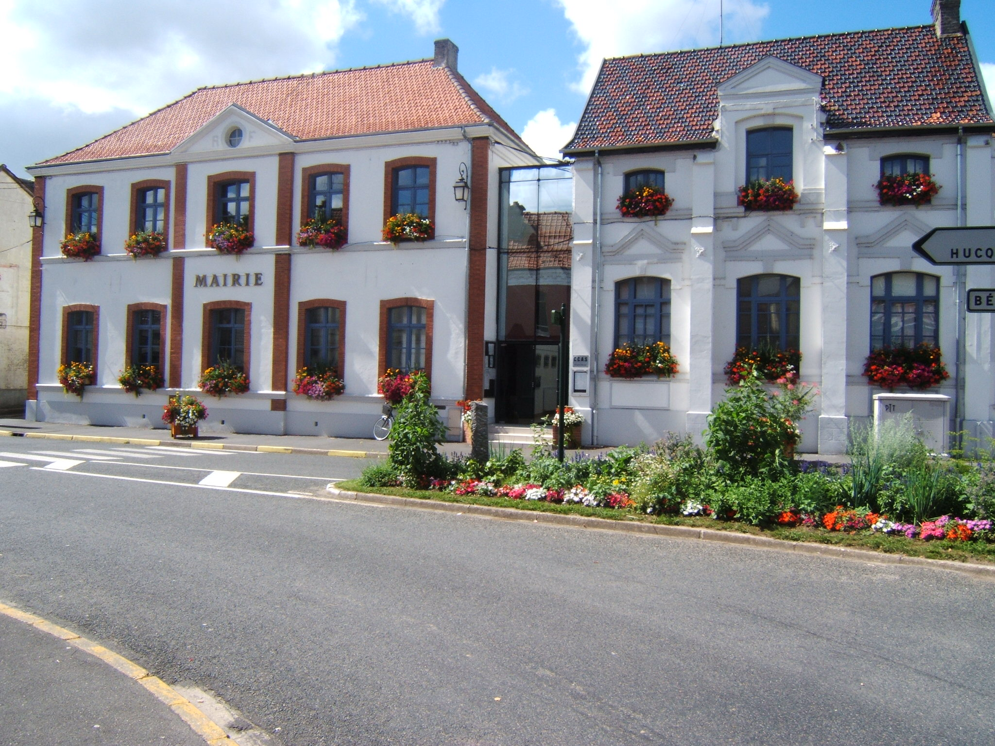 La Mairie rénovée depuis 2006